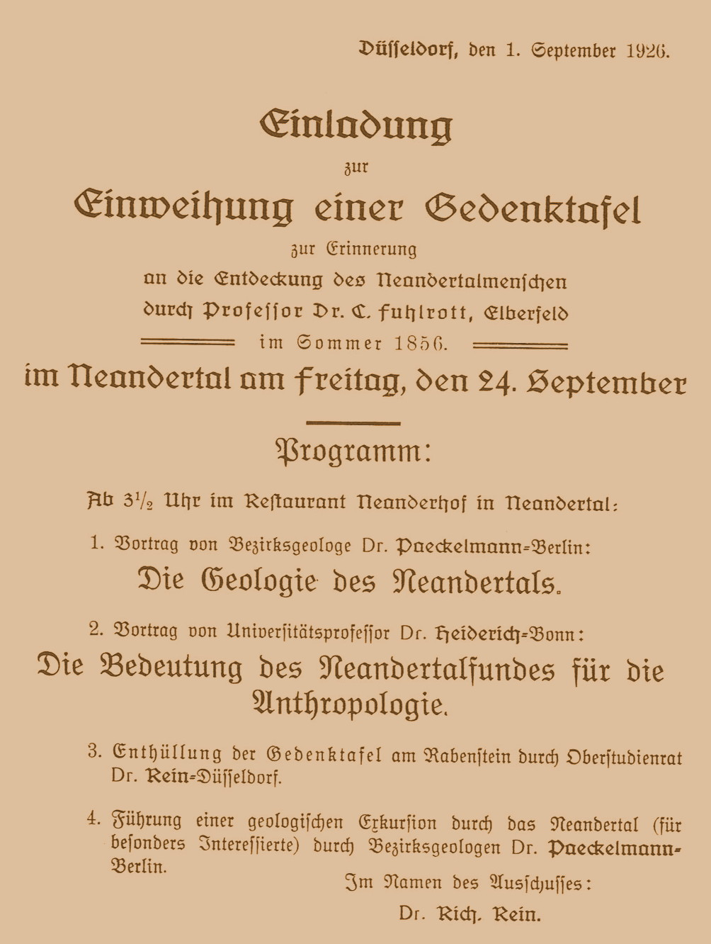 Einladungskarte zur Feier der Enthüllung einer Denkmaltafel für Johann Fuhlrott am Rabenstein am 24. September 1926